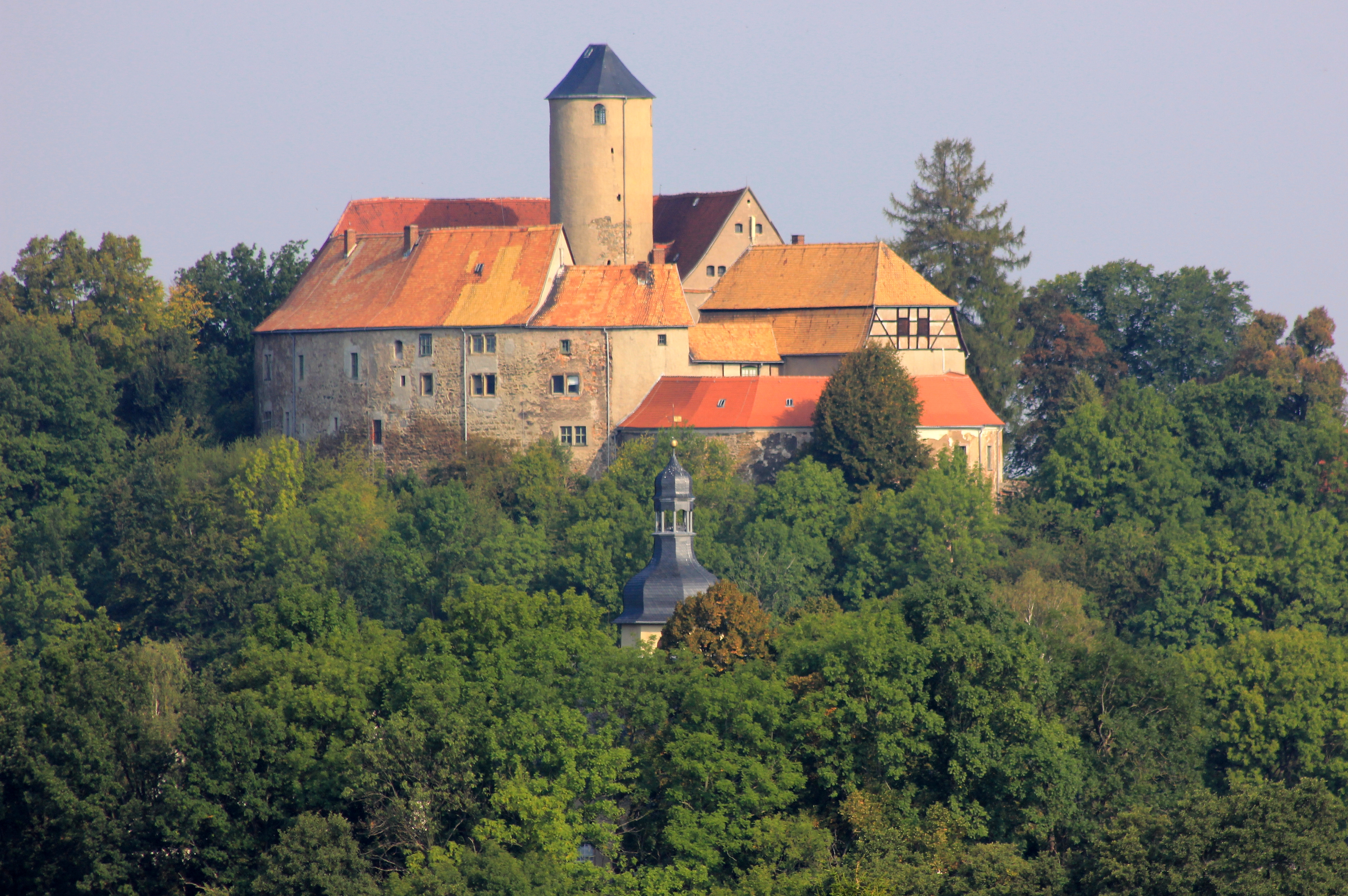 Burg Schönfels. Burgstraße 34, 08115 Lichtentanne. Sachsen.